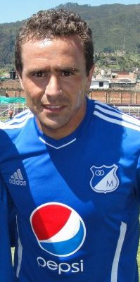 Matias Urbano